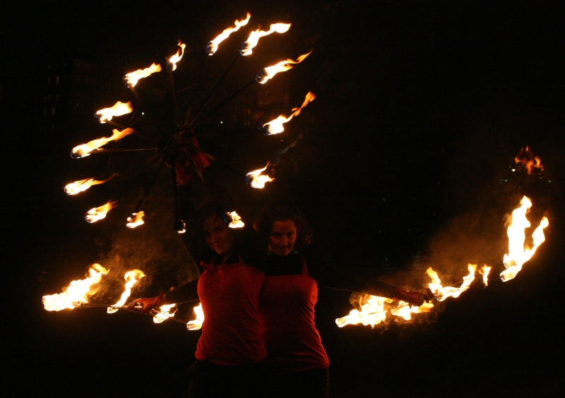 Krakowski Teatr Tancerzy Ognia SIRRION i wachlarze do tańca z ogniem